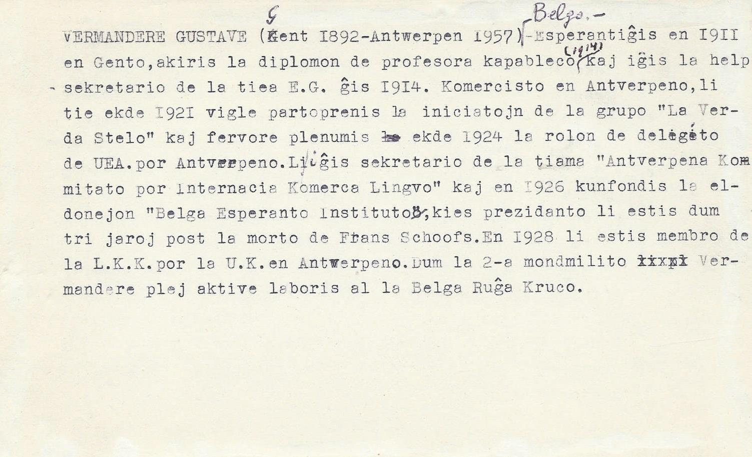 Slipo pri Gustave Vermandere FelixArchief (arĥivaĵo 2233-267)